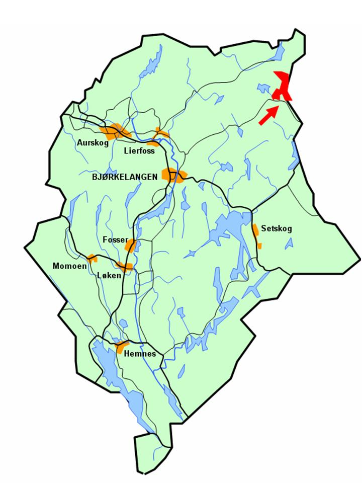 Stilisert kart som viser Mangen sin lokalisering i Aurskog-Høland kommune.